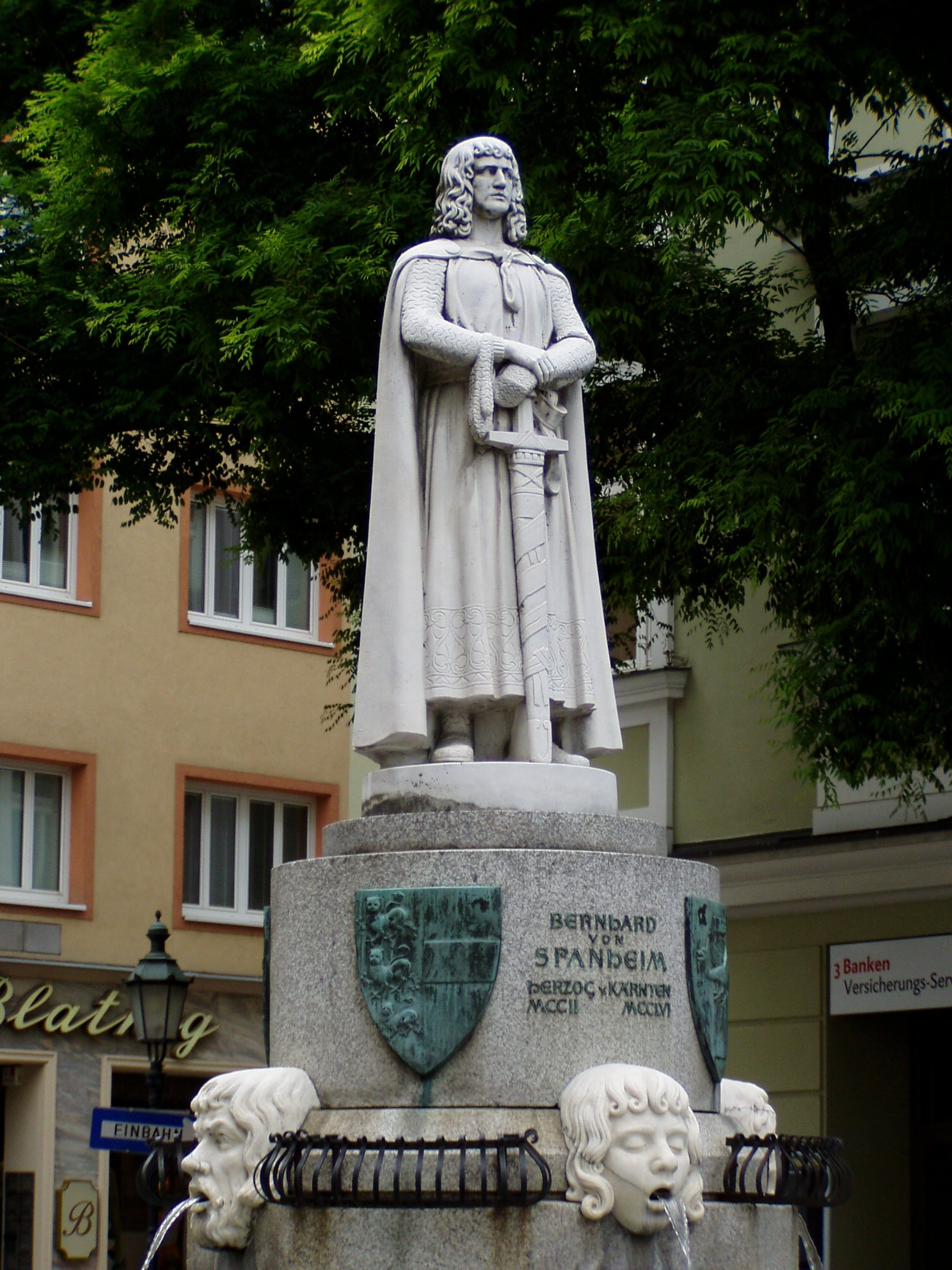 Bernhard von Spanheim, fountain at Arthur Lemisch-Platz in Klagenfurt, Carinthia